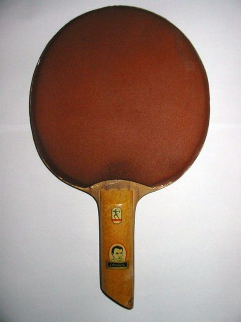 Rare raquette Stiga, modèle "Ehrlich", avec 2 revêtements en mousse épaisse rouge sans caoutchouc, bois 3 plis, manche droit biseauté, stickers "STIGA" et "Ehrlich" (avec l'image du joueur) d'un côté du manche. Ce modèle date des années 50, car le manche n'est pas percé de trous, les modèles plus récents ayant des petits trous de chaque côté, caractéristiques des bois Ehrlich. Les revêtements en mousse épaisse non recouverte de caoutchouc sont également caractéristiques des premières raquettes à mousse dans les années 50.